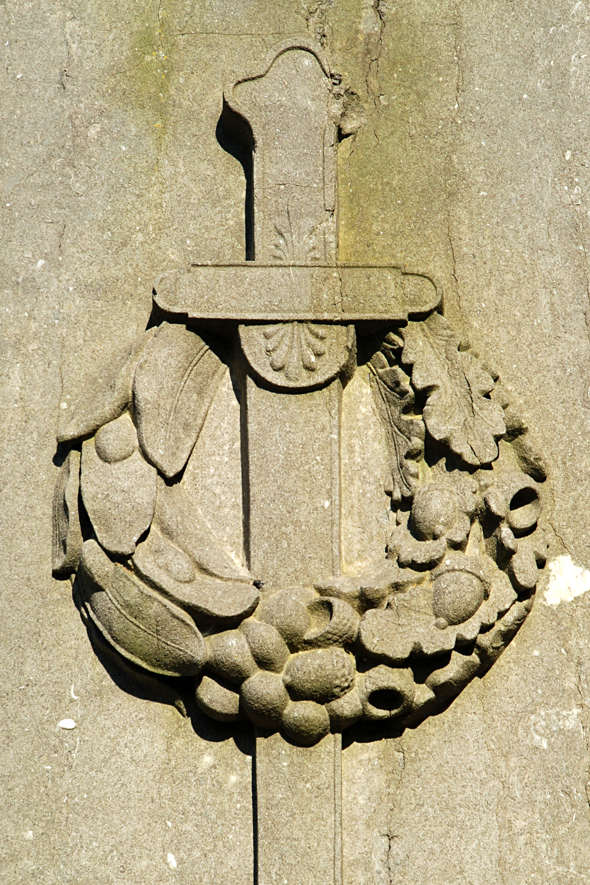 Belgique - Brabant wallon - Genappe - Ways - Mausolée Duhesme (tombe du Général Duhesme, mort des suites des blessures encourues à la bataille de Waterloo)